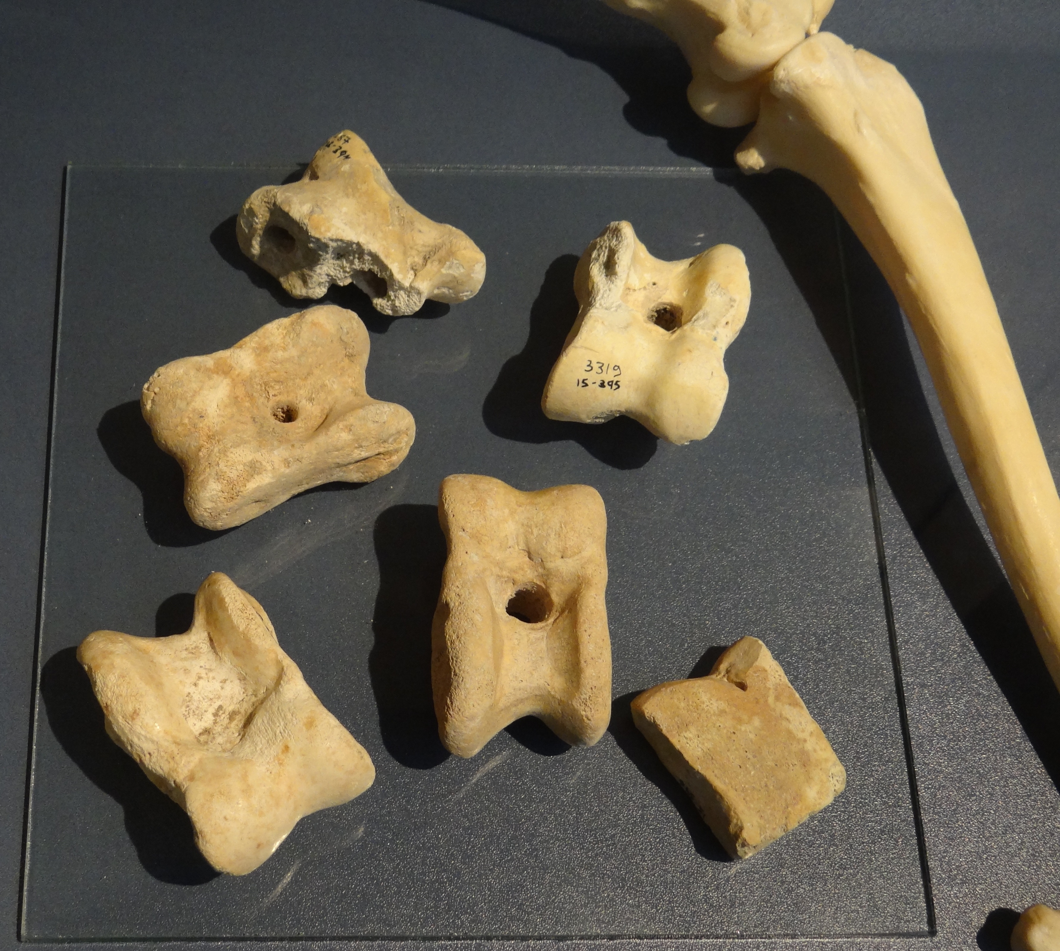 כלי משחק בצורת אסטרגל שנמצאו במרשה המאות ה-3-2 לפניה הספירה בתקופה ההלניסטית